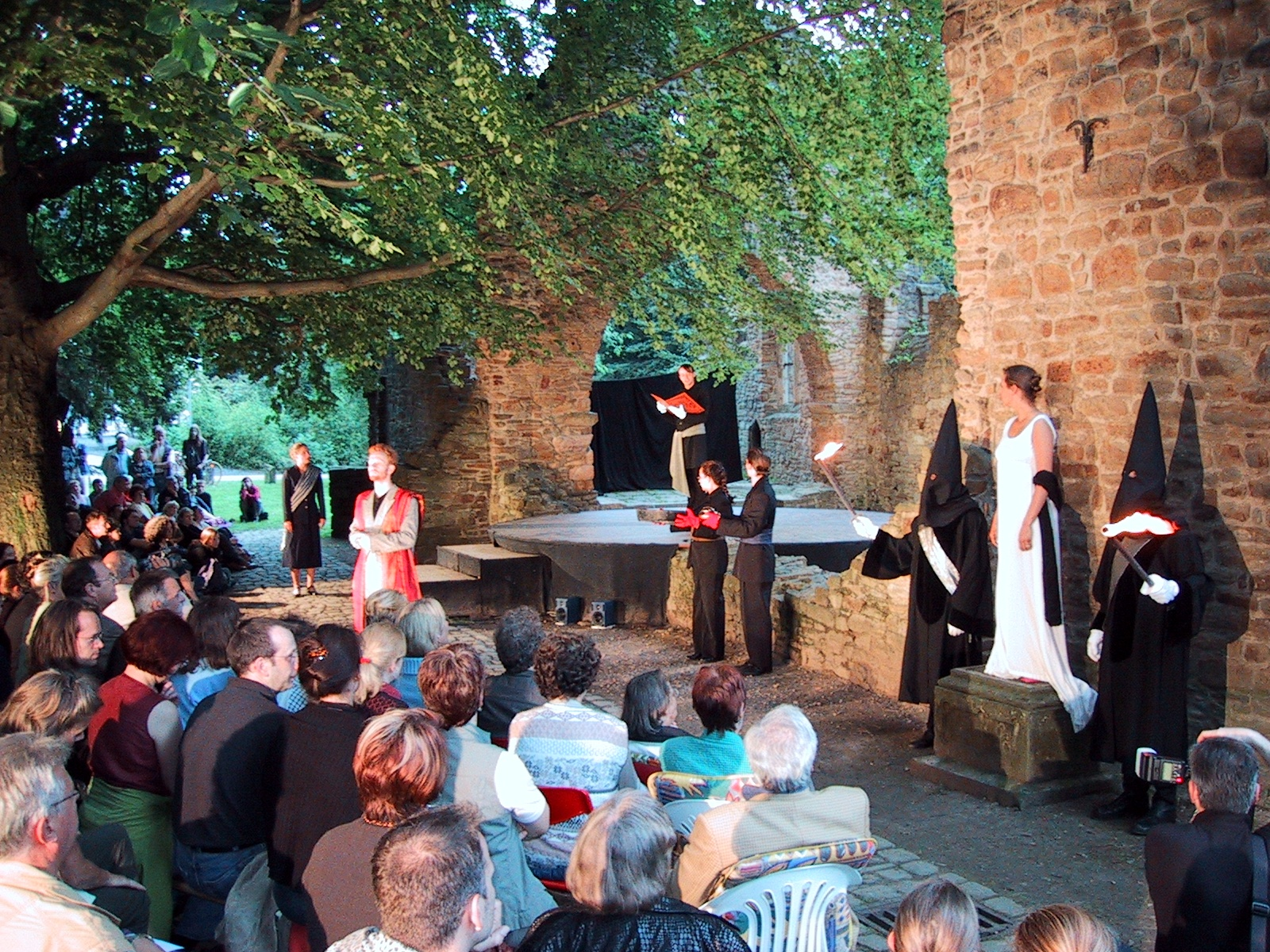 Aufführung eines Shakespeare-Stück der Schauspielschüler der Schauspielschule Bochum im Schloßpark Weitmar Source: own work Date: Summer 2001, Bochum, Germany Author: Maschinenjunge Licence: GFDL, cc-by 3.0